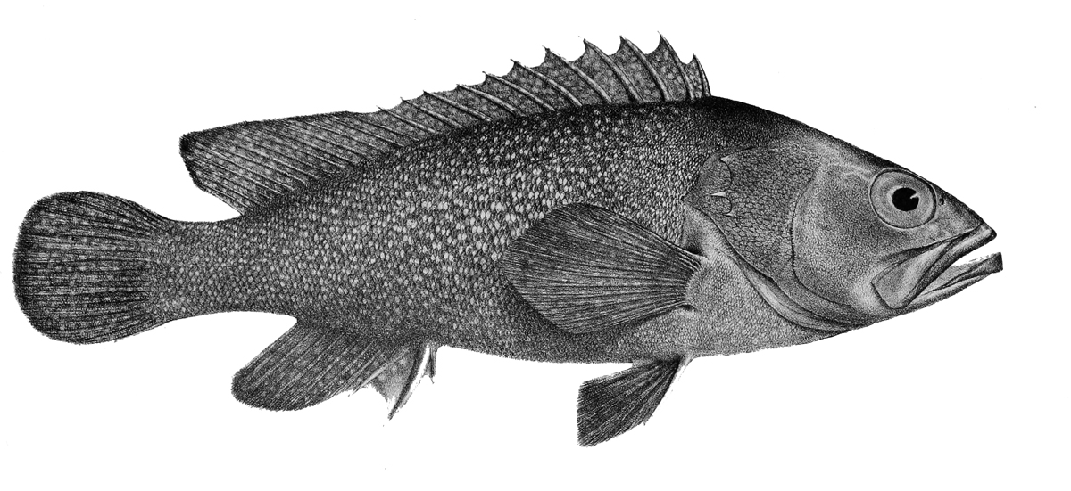 Epinephelus summana